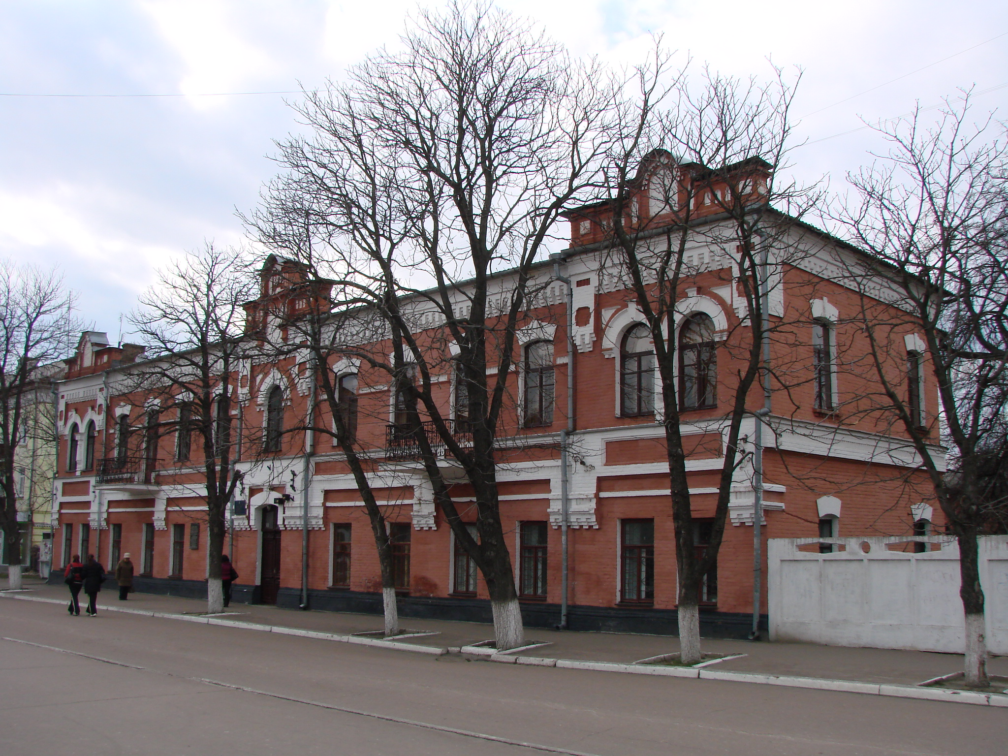 Будинок купецького зібрання, Ніжин, вул. Гоголя, 4